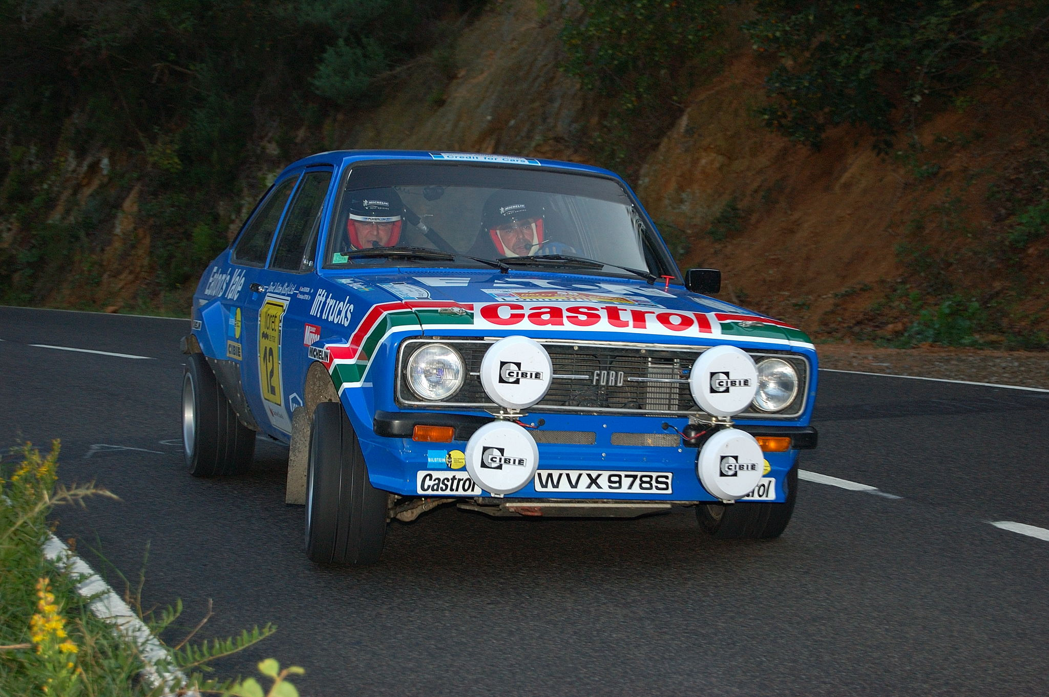 Dominique Depons - Ford Escort RS1800 Gr.4